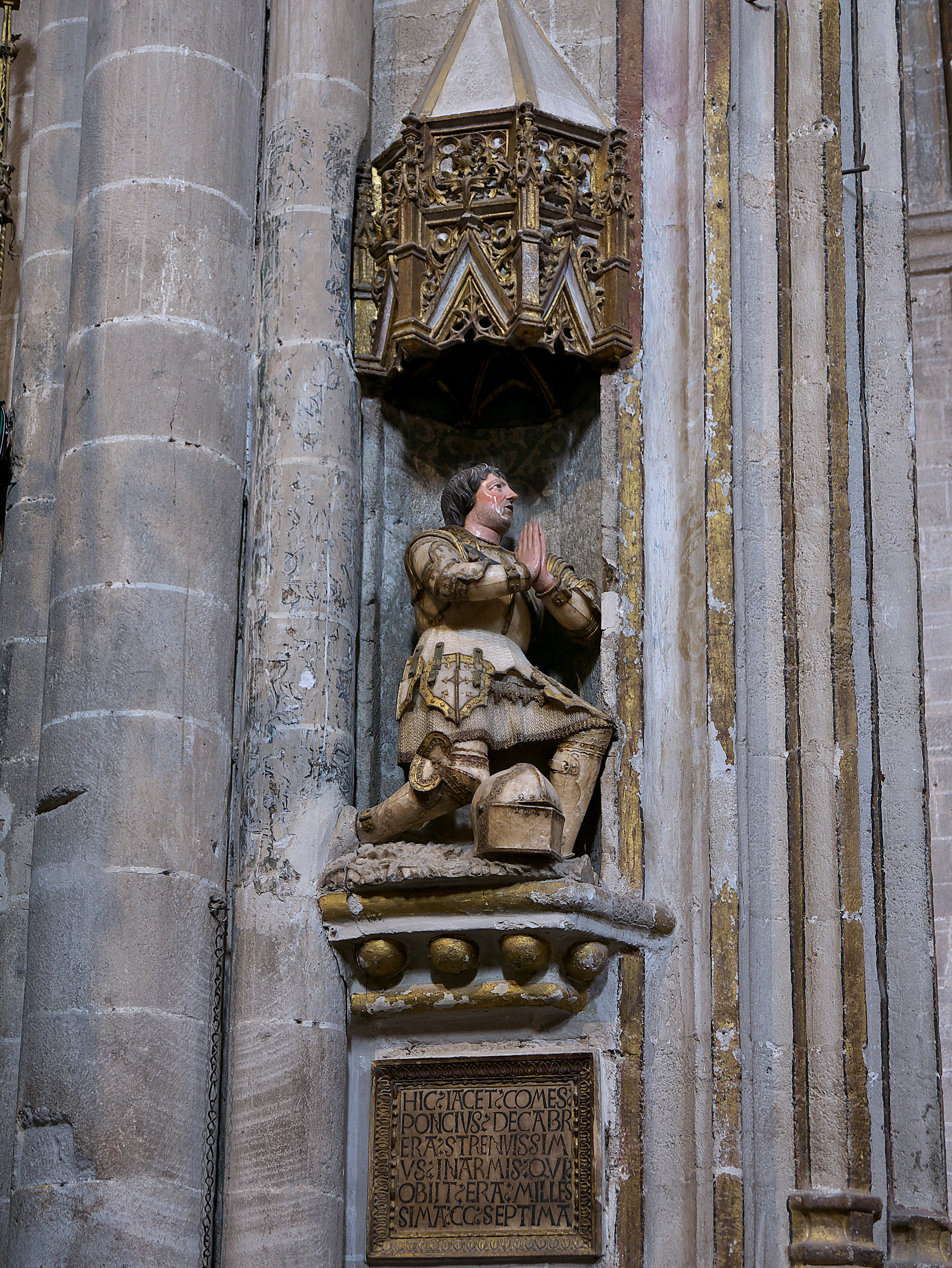 Sepulcro del legendario Ponce Giraldo de Cabrera (ca †1169), señor de Zamora y fundador del Monasterio de Santa María de Moreruela.